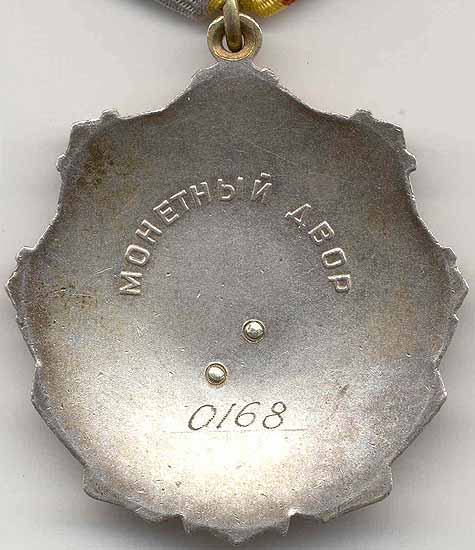 Орден Трудовой Славы I степени. Обратная сторона